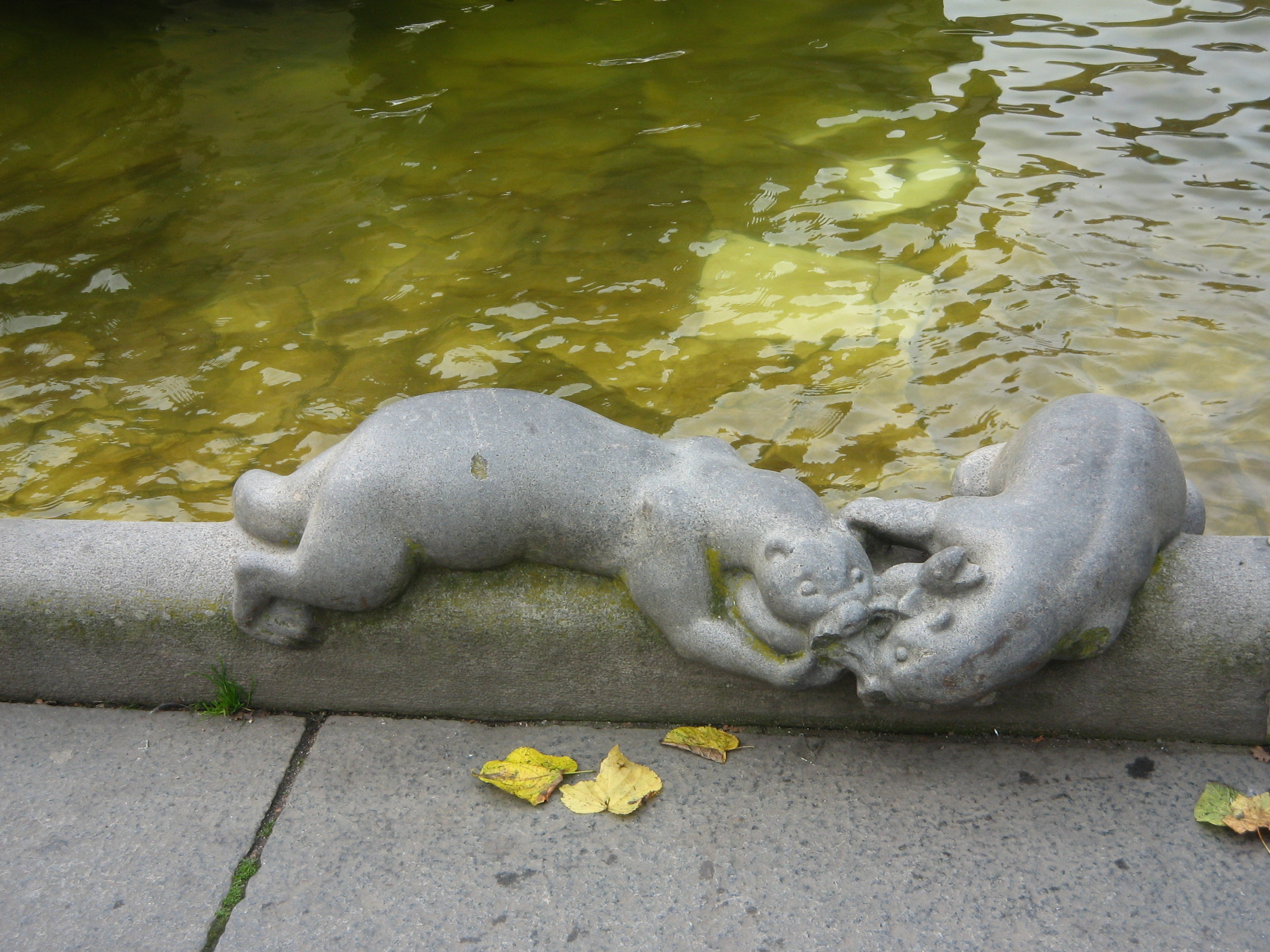 Nils Sjögrens Sjuhäradsbrunnen på Stora torget i Borås, invigd juni 1941. Detalj, uttrar.